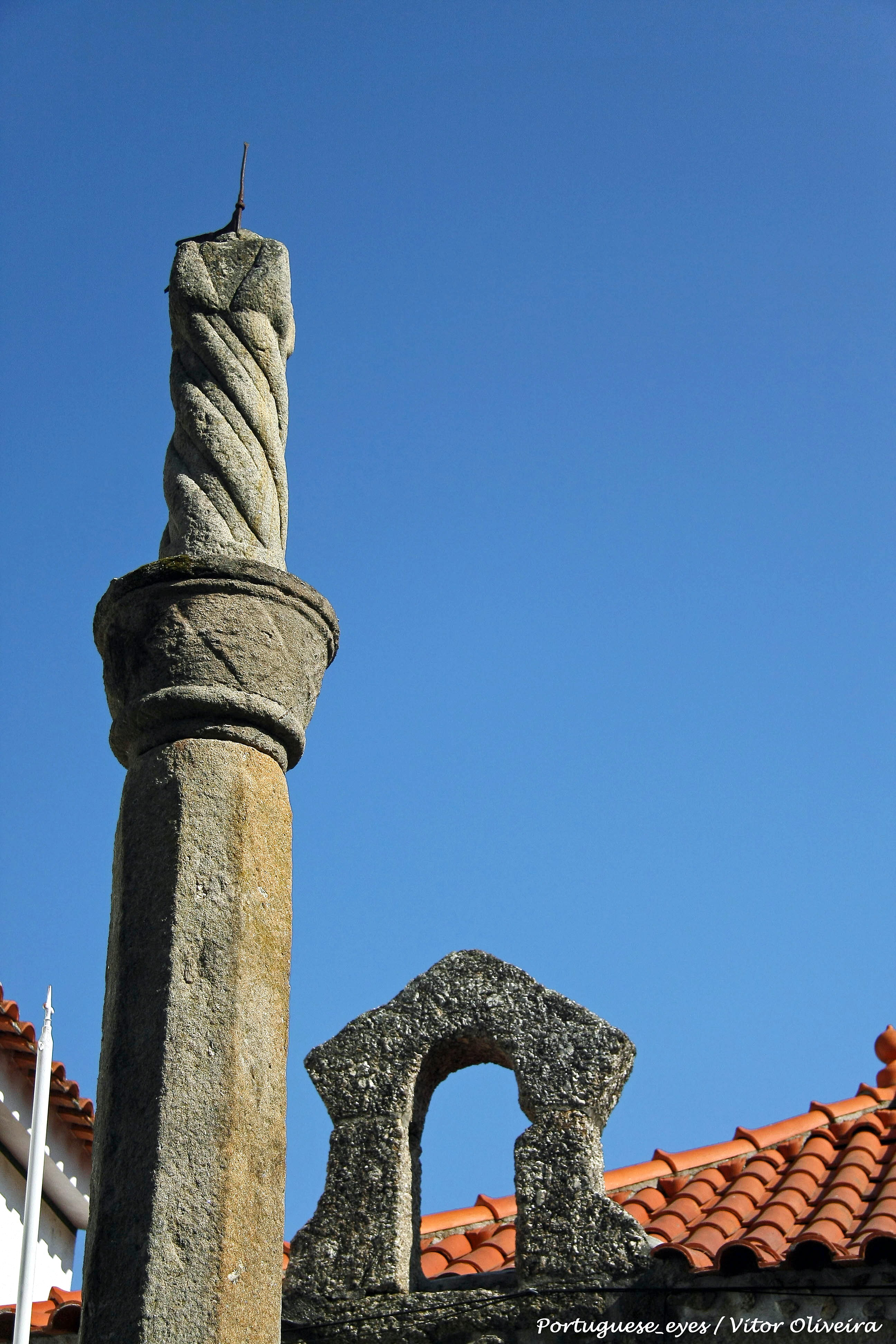 Penalva de Alva, antigamente Penalva de São Gião, foi villa e concelho muito antigo, com categoria municipal certamente anterior ao único foral conhecido, dado por D. Manuel em 1516. É actualmente freguesia de Oliveira do Hospital, mas conserva um importante testemunho da sua anterior autonomia, na forma do pelourinho. Este levanta-se diante dos antigos Paços do Concelho, e data seguramente dos anos subsequentes à atribuição do foral manuelino, de acordo com a sua tipologia. O pelourinho possui plataforma de quatro degraus quadrangulares, de aresta, o superior com o topo ligeiramente abaulado, funcionando como base da coluna. Esta tem secção inicialmente quadrada, formando ressalto cúbico na base, de ângulos lavrados; segue com secção octogonal, conseguida mediante chanframento dos ângulos. O fuste estreita no topo, fazendo a transição para o capitel, constituído por astrágalo, cesto tronco-cónico bojudo, e ábaco oitavado. O remate consta de um pináculo alto, espiralado à esquerda, sobrepujado de grimpa constituída por espigão em ferro com bandeirola vazada por uma cruz (de Malta?) estilizada. Uma nota da Câmara Municipal (MALAFAIA, E. B. de Ataíde, 1997) indica que este pelourinho veio substituir outro, em madeira, situação perfeitamente habitual, e que justifica a existência de tão poucas picotas anteriores ao século XVI: muitas destas eram construídas em madeira, e mais tarde substituídas por exemplares em pedra, muito mais onerosos. SML . See where this picture was taken. [?]